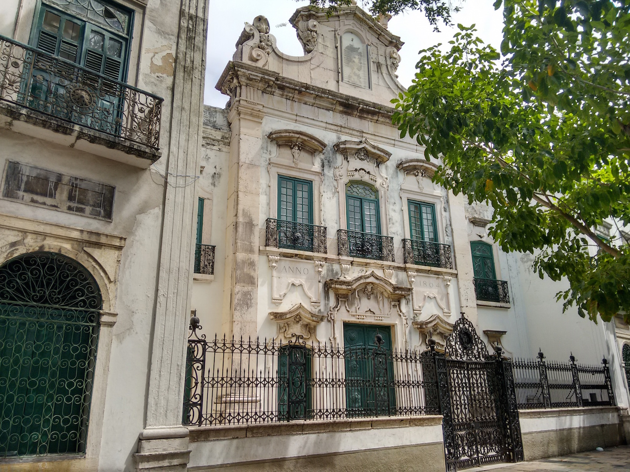 Igreja da Ordem Terceira de São Francisco, onde funciona o Museu Franciscano de Arte Sacra - Rua do Imperador, Recife, Brasil.